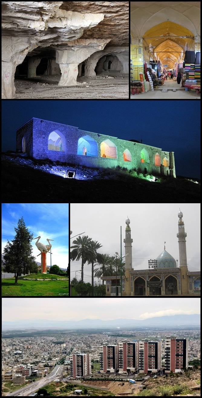 some of the famous places of jahrom